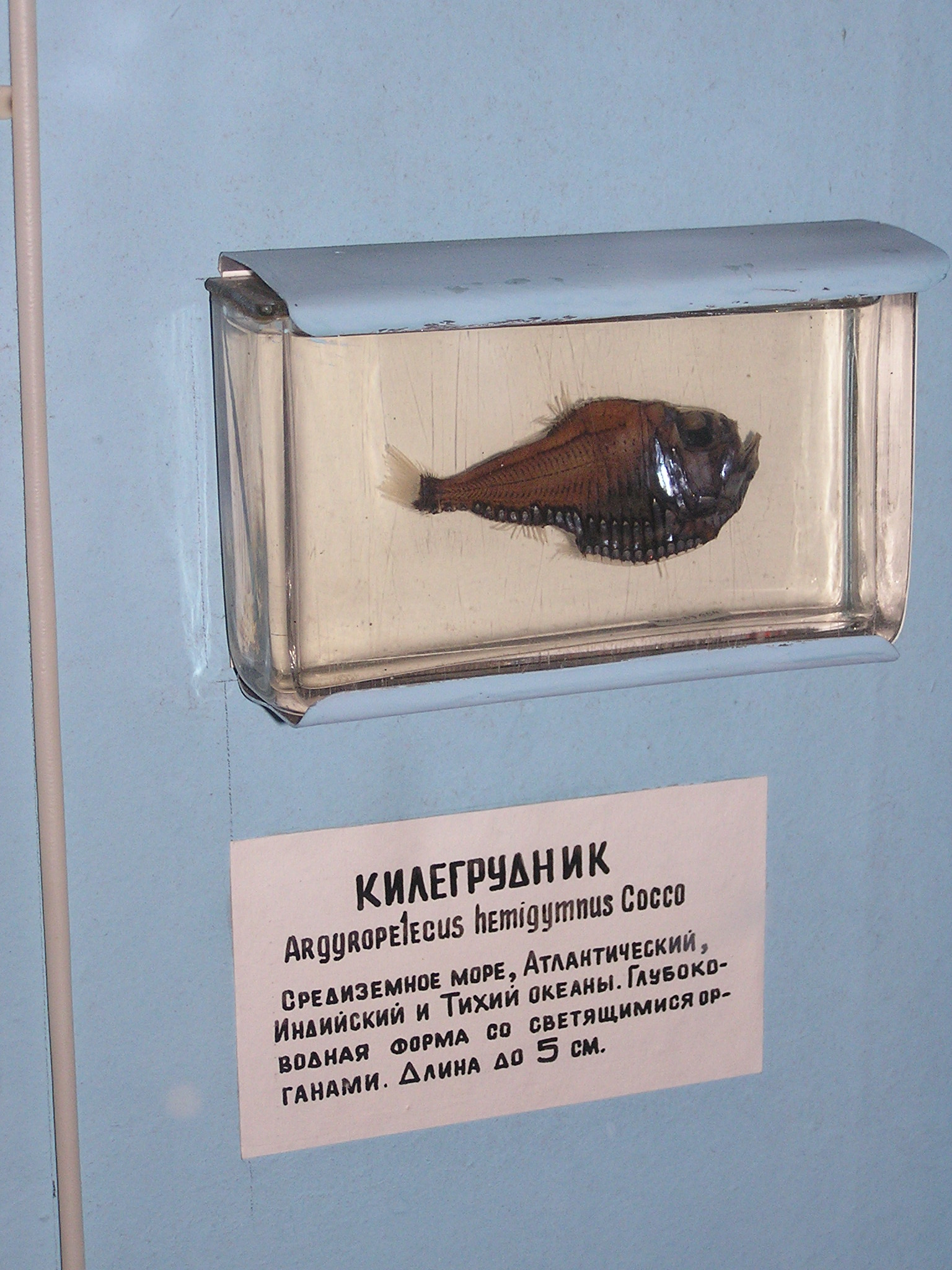 Зоологический музей в Санкт-Петербурге. Килегрудник